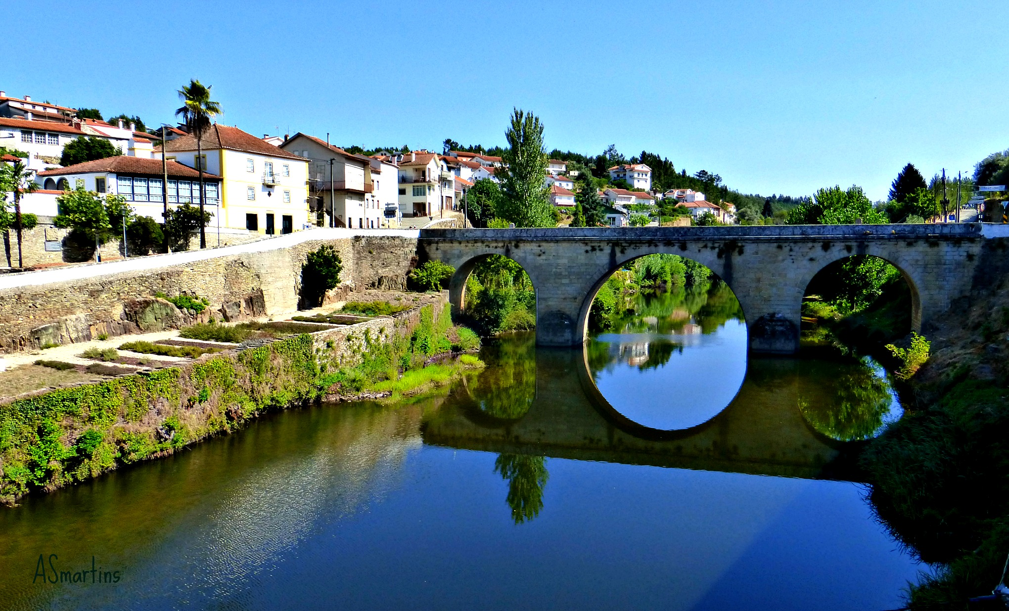 Ponte sobre o Rio Alba-Coja/Portugal